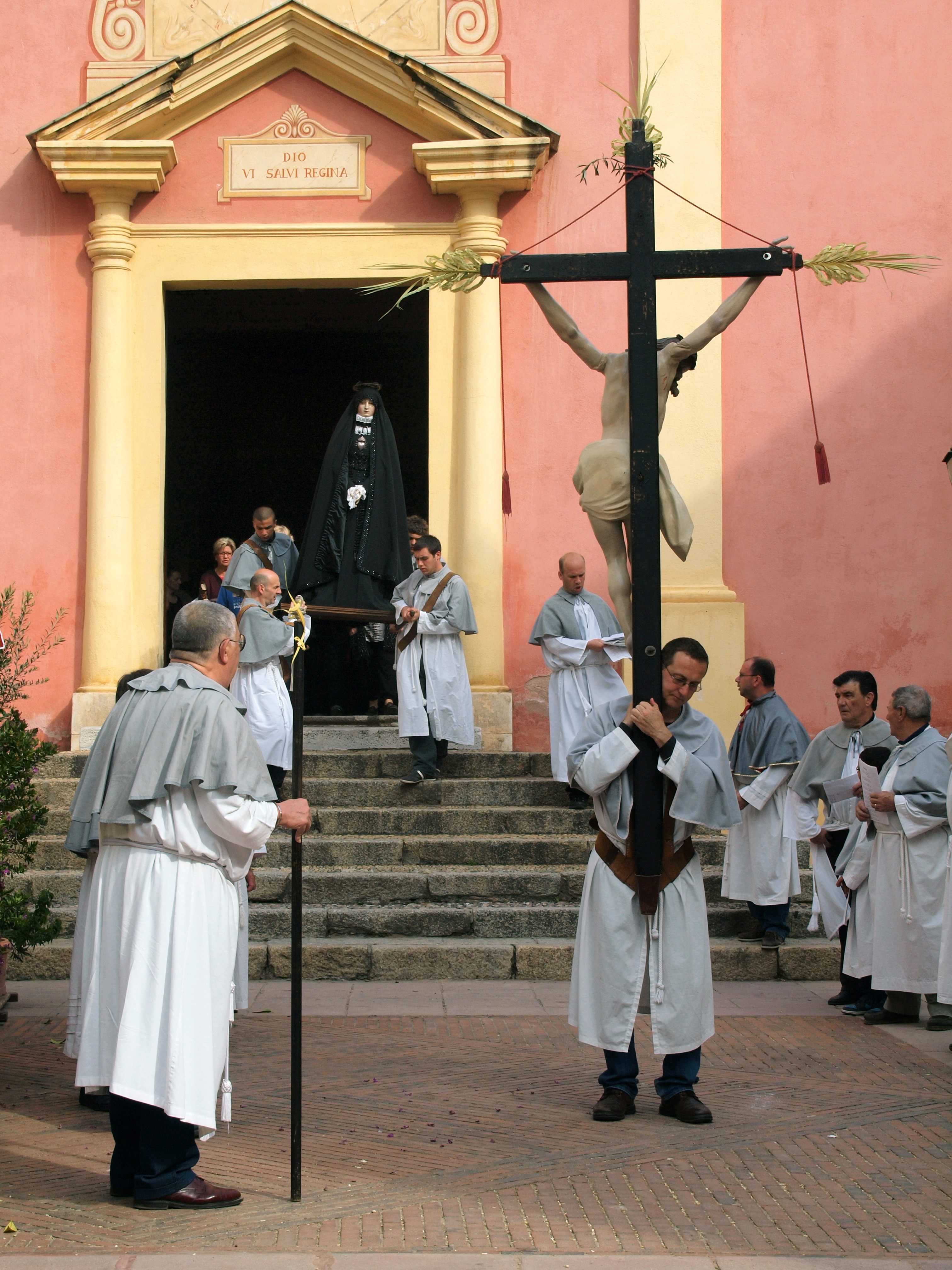 Calvi (Corse) - A Cerca, procession du Vendredi Saint matin. Le corps du Christ et Notre Dame des Douleurs sortent de l'église Sainte-Marie-Majeure dans la Basse ville, transportés par les confrères